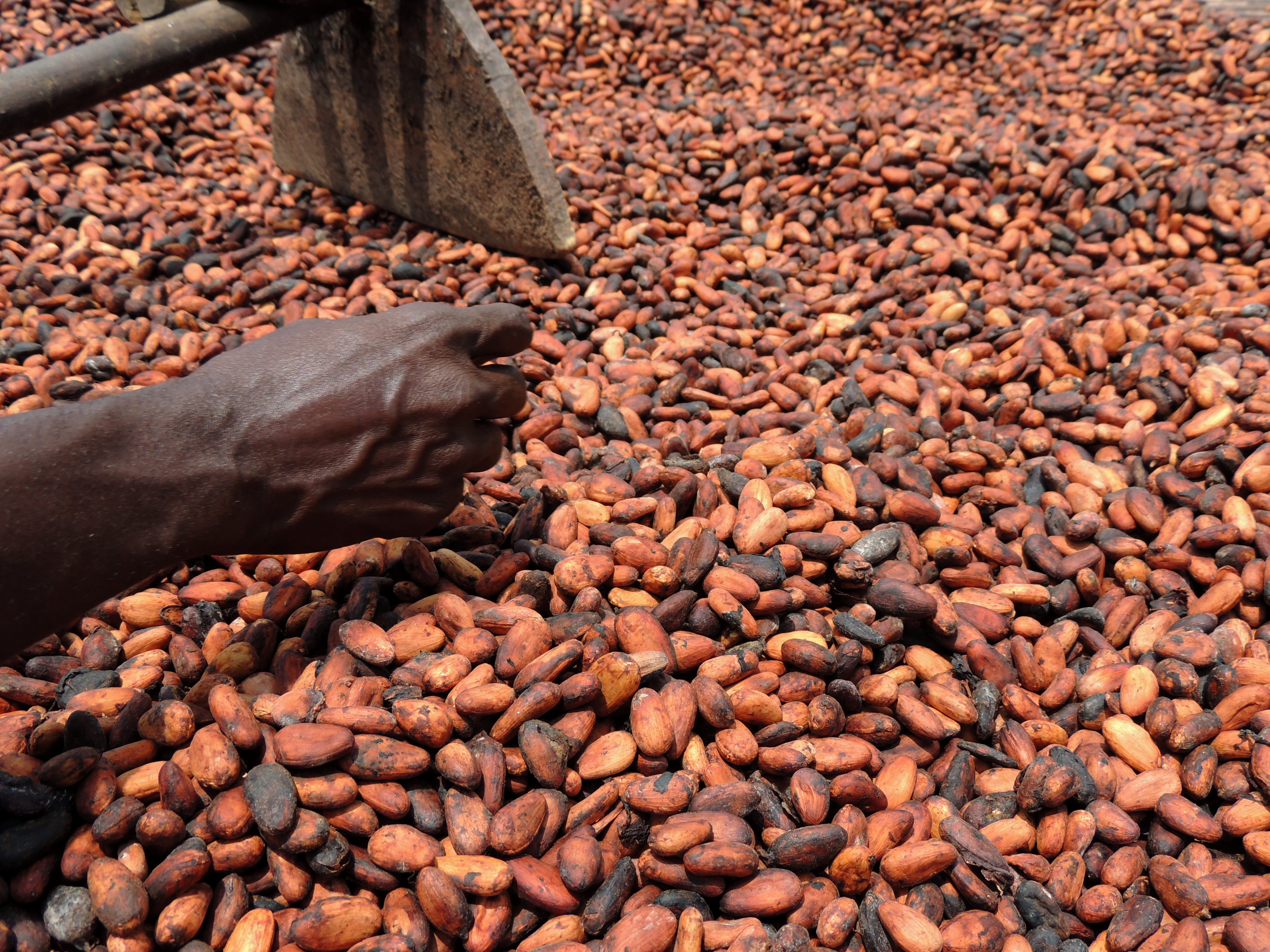 Cultivateur ivoirien de cacao vérifiant si les fèves ont assez séchées au soleil. This is an image of "African people at work" from Ivory Coast